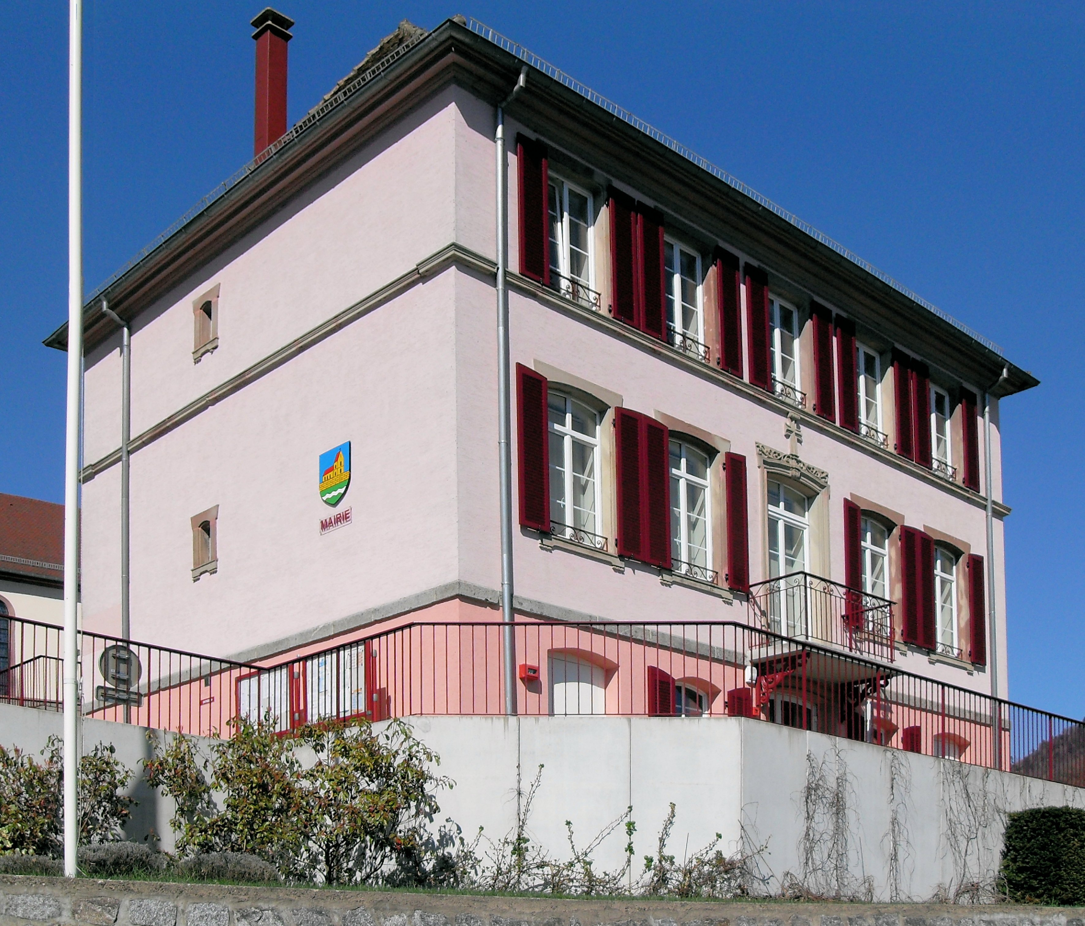 La mairie de Kirchberg